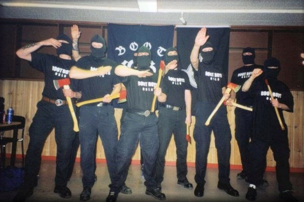 Aktivister fra den høyreekstreme gruppa "Boot Boys". Scan fra foto jeg tok ca. 1998-1999.